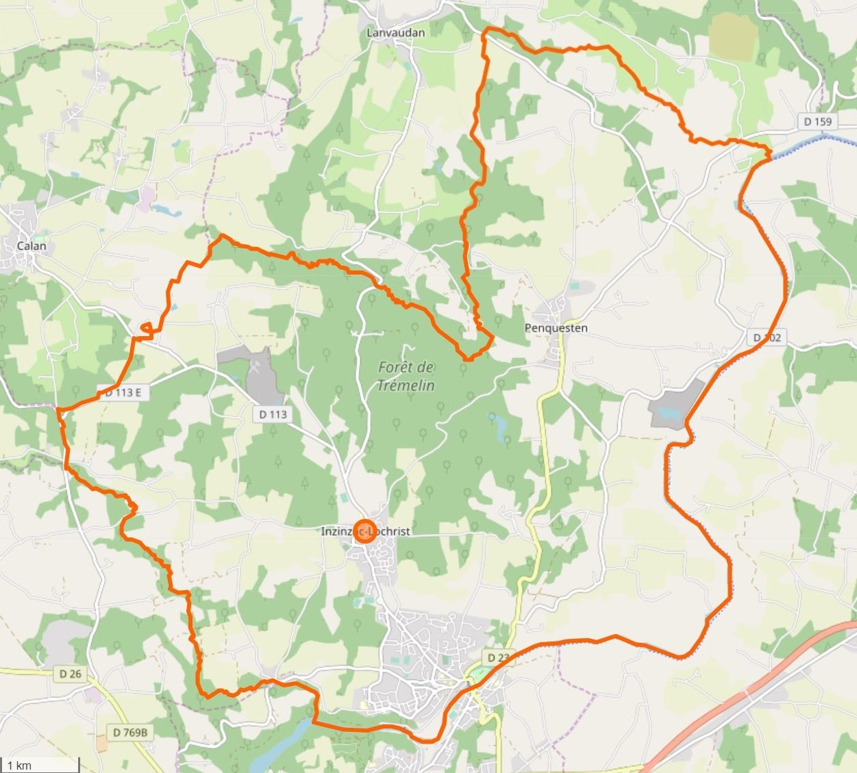 Cette carte a été créée à partir des données du projet Openstreetmap. This map may be incomplete, and may contain errors. Don't rely solely on it for navigation.